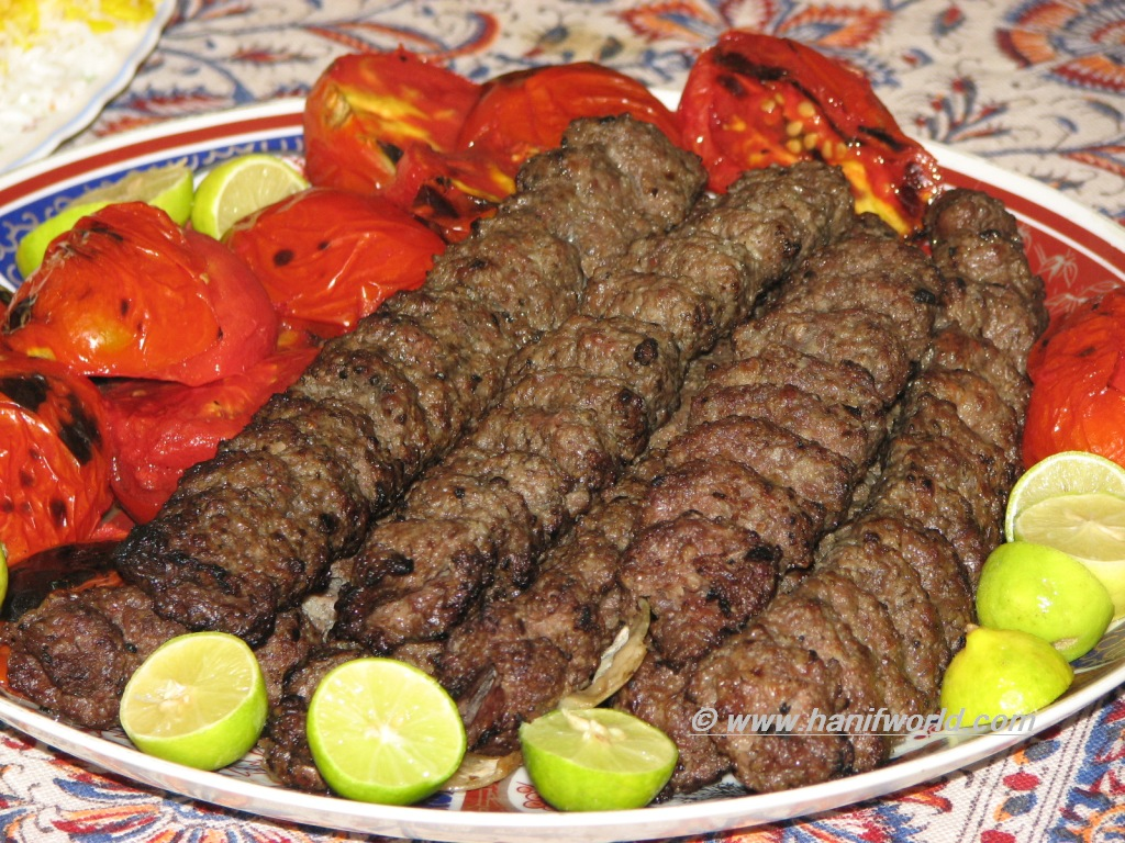 الكباب العراقي (الكفتة المشوية)